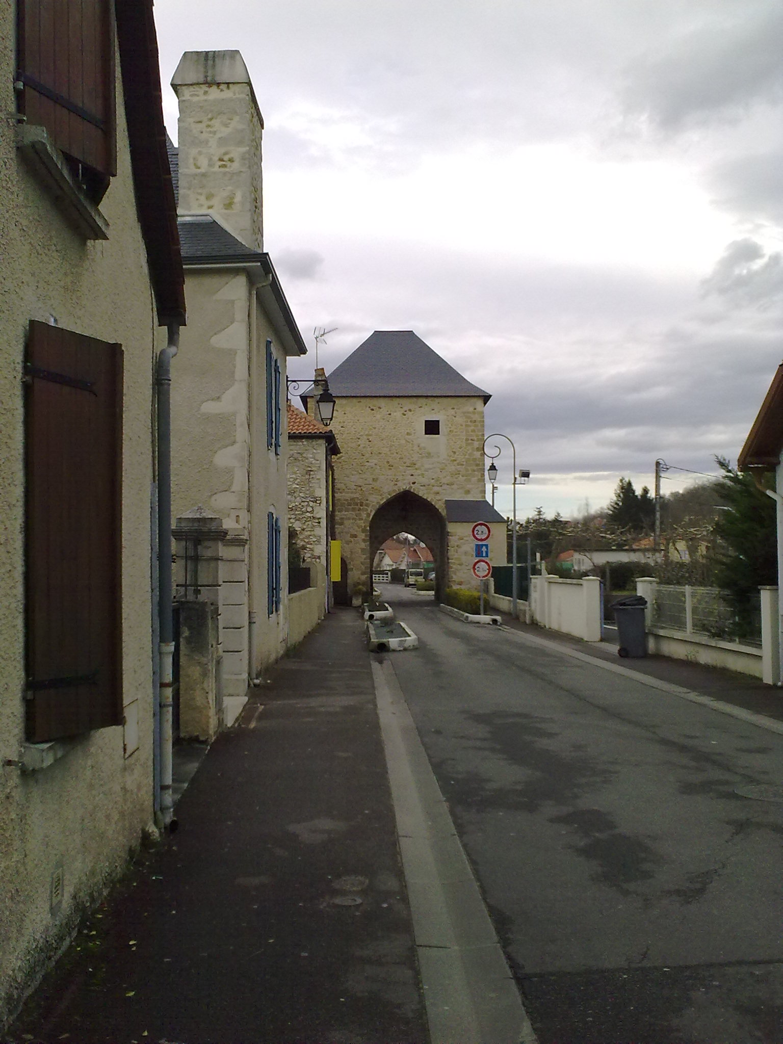 Passage étroit remarquable de Gan